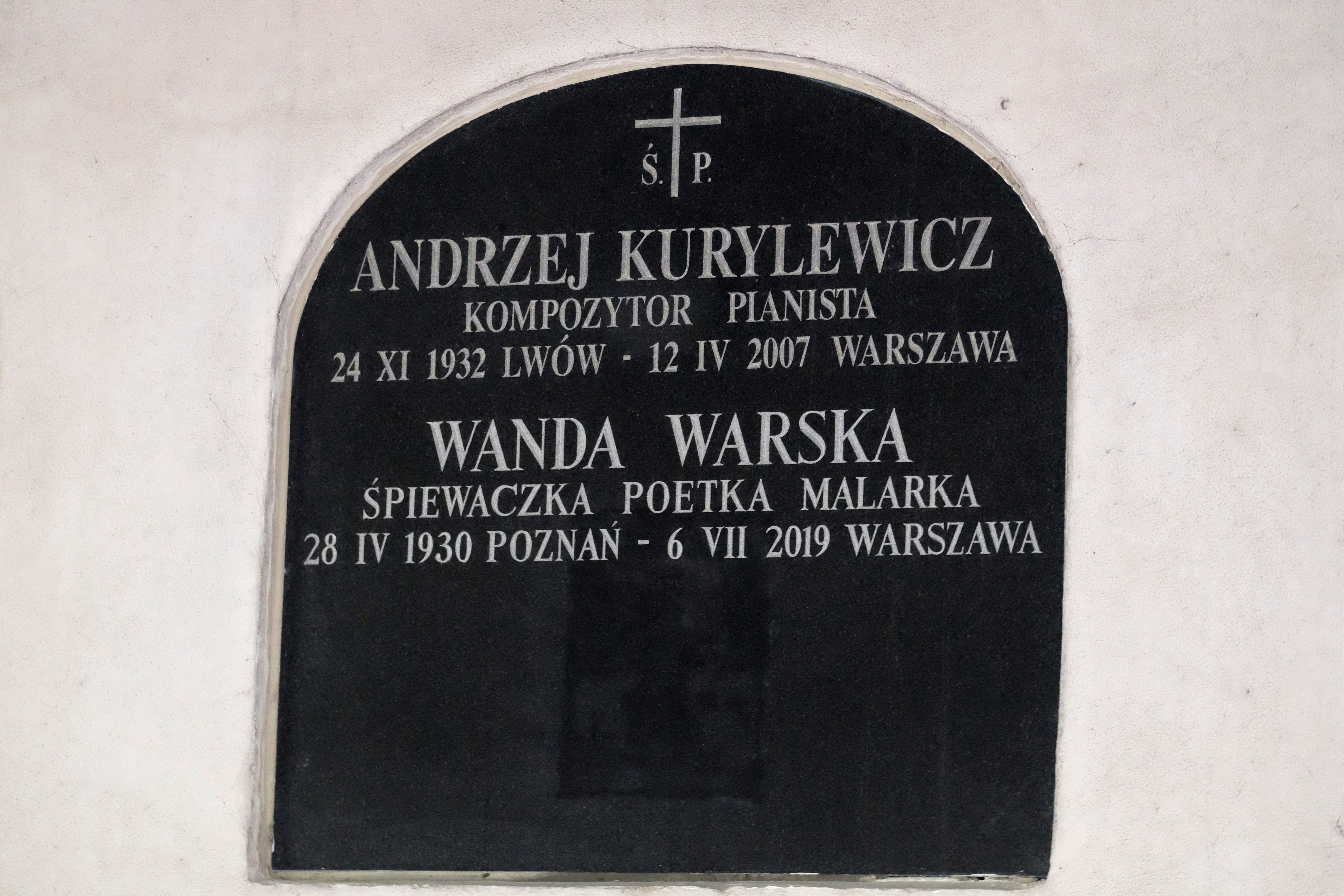 Grób muzyka i kompozytora Andrzeja Kurylewicza oraz wokalistki, malarki i poetki Wandy Warskiej w katakumbach na Cmentarzu Powązkowskim w Warszawie